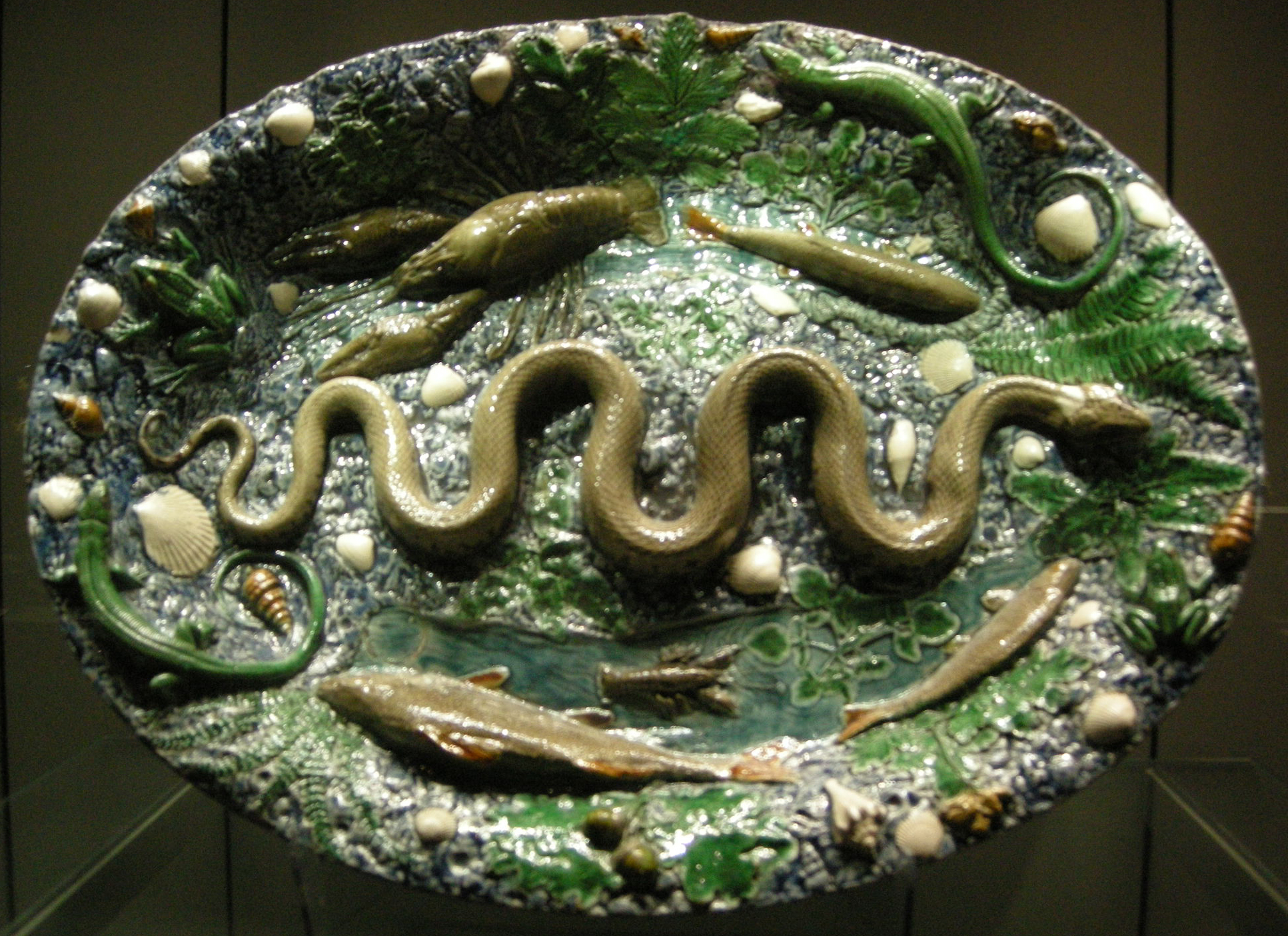 Bassin « rustique », traditionnellement proposé comme une œuvre de Bernard Palissy. France (fin du XVIe siècle - début du XVIIe siècle)